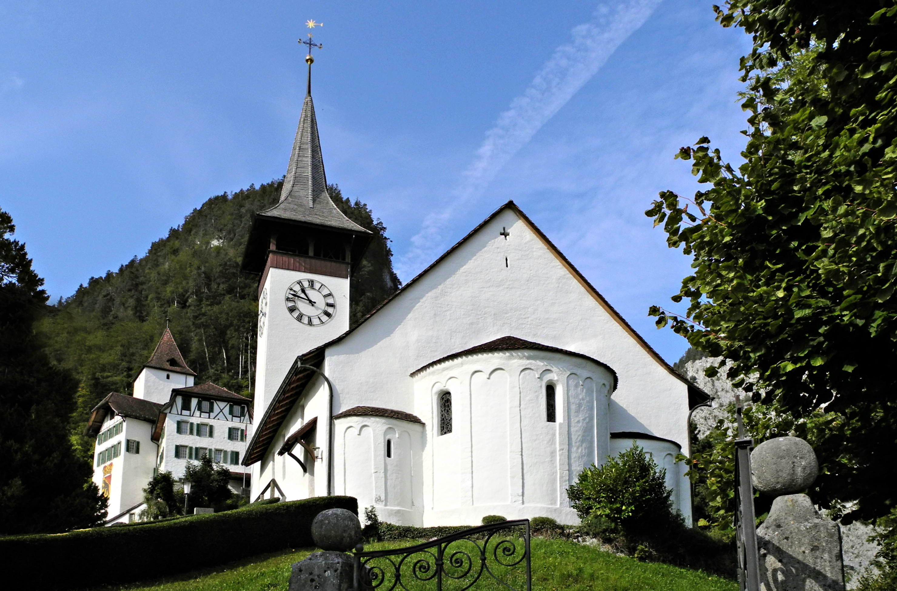 Wimmis, Schloss und Kirche St. Martin (eine der 14 Thunerseekirchen) liegen unmittelbar hintereinander. Ansicht der drei Apsiden